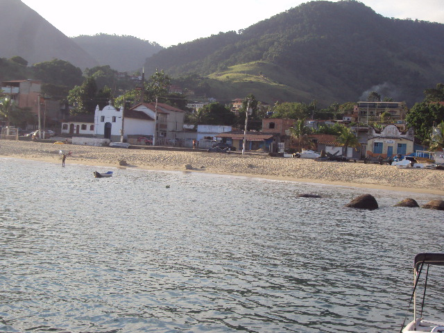 Praia em Conceição de Jacareí, Mangaratiba, estado do Rio de Janeiro, Brasil.